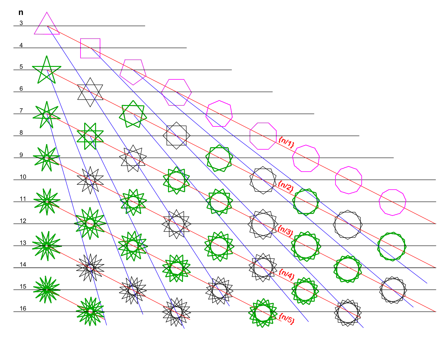 Regulaj stelaj plurlateroj